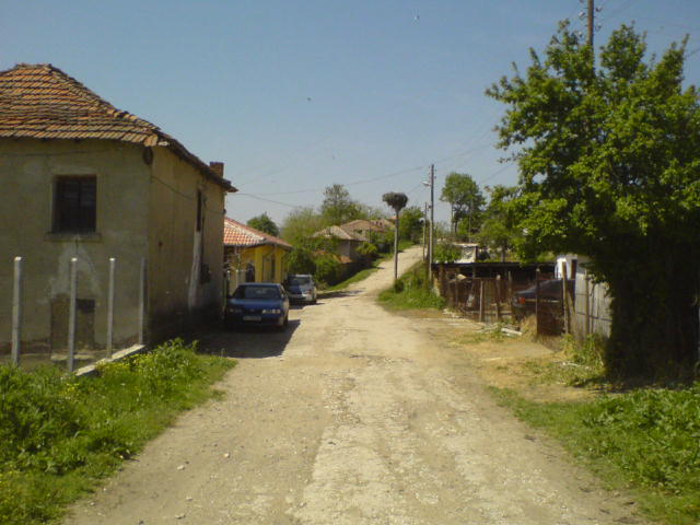 Улица в Драбишна